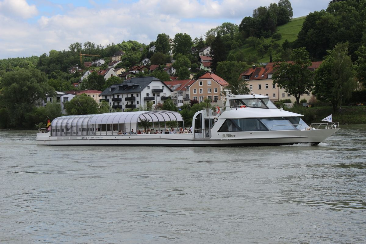 Fahrgastschiff Sunliner, ENI 04812740 auf dem Inn in Passau. 'Sunliner ist ein Fahrgastschiff auf der Donau und wird als Tagesausflugsschiff im Linienverkehr und für Themenfahrten eingesetzt. Das Schiff wird von der Donau-Schiffahrts-Gesellschaft Wurm + Noé betrieben. Es ist zugelassen für maximal 250 Personen.